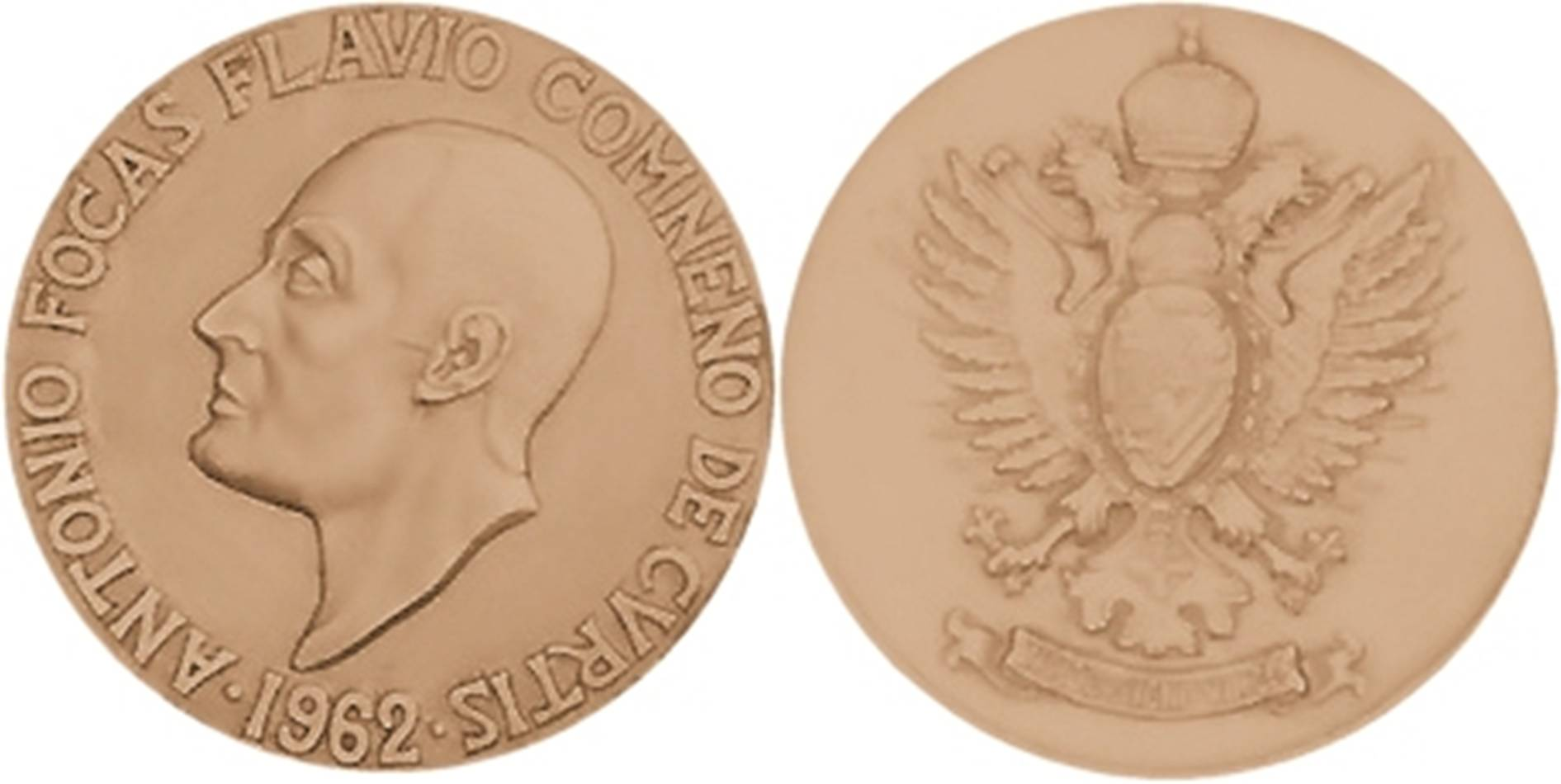 Medaglia d'oro di Totò